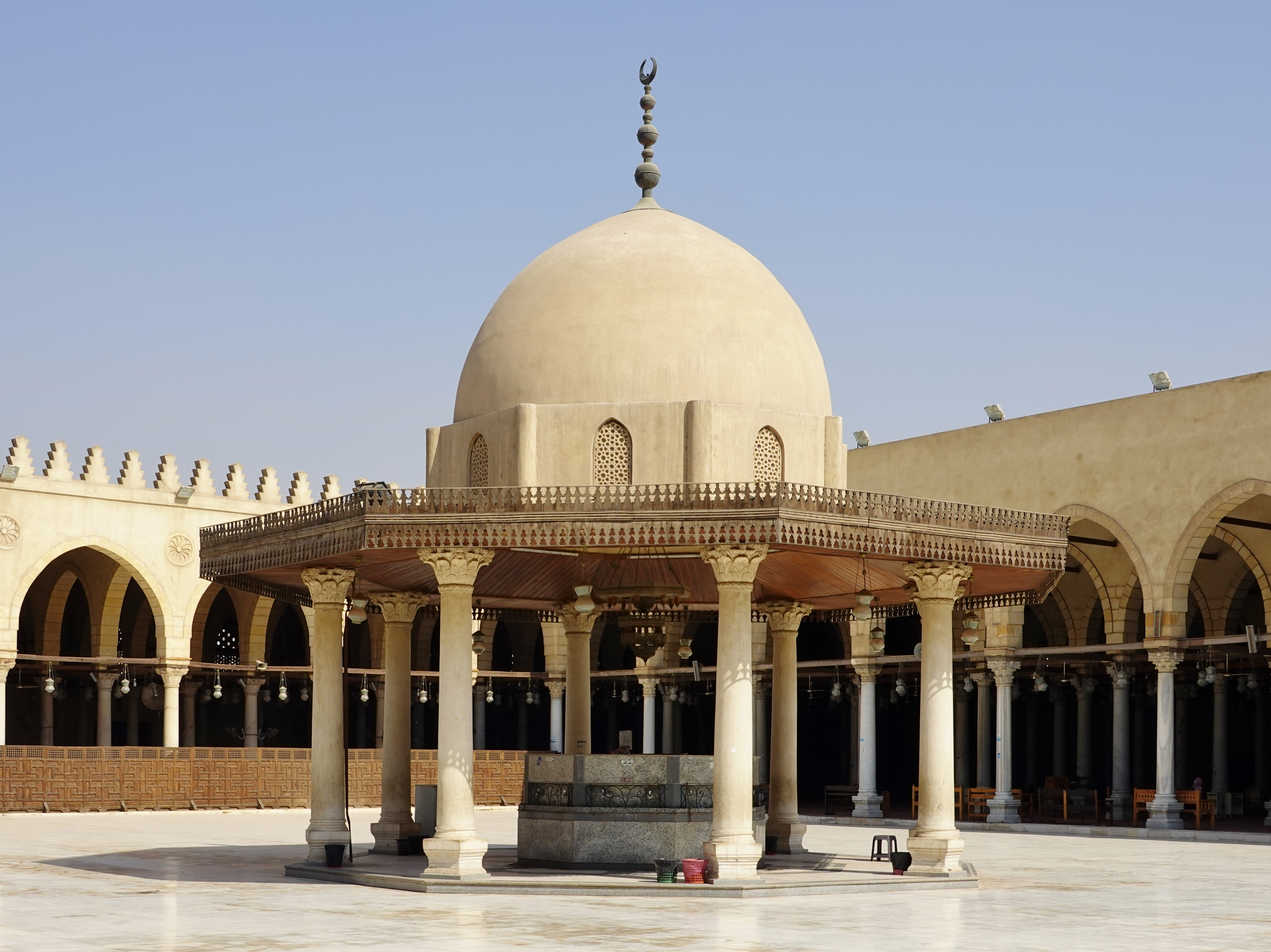 Brunnenhaus der Amr-ibn-Al-Aas-Moschee in Kairo, Ägypten